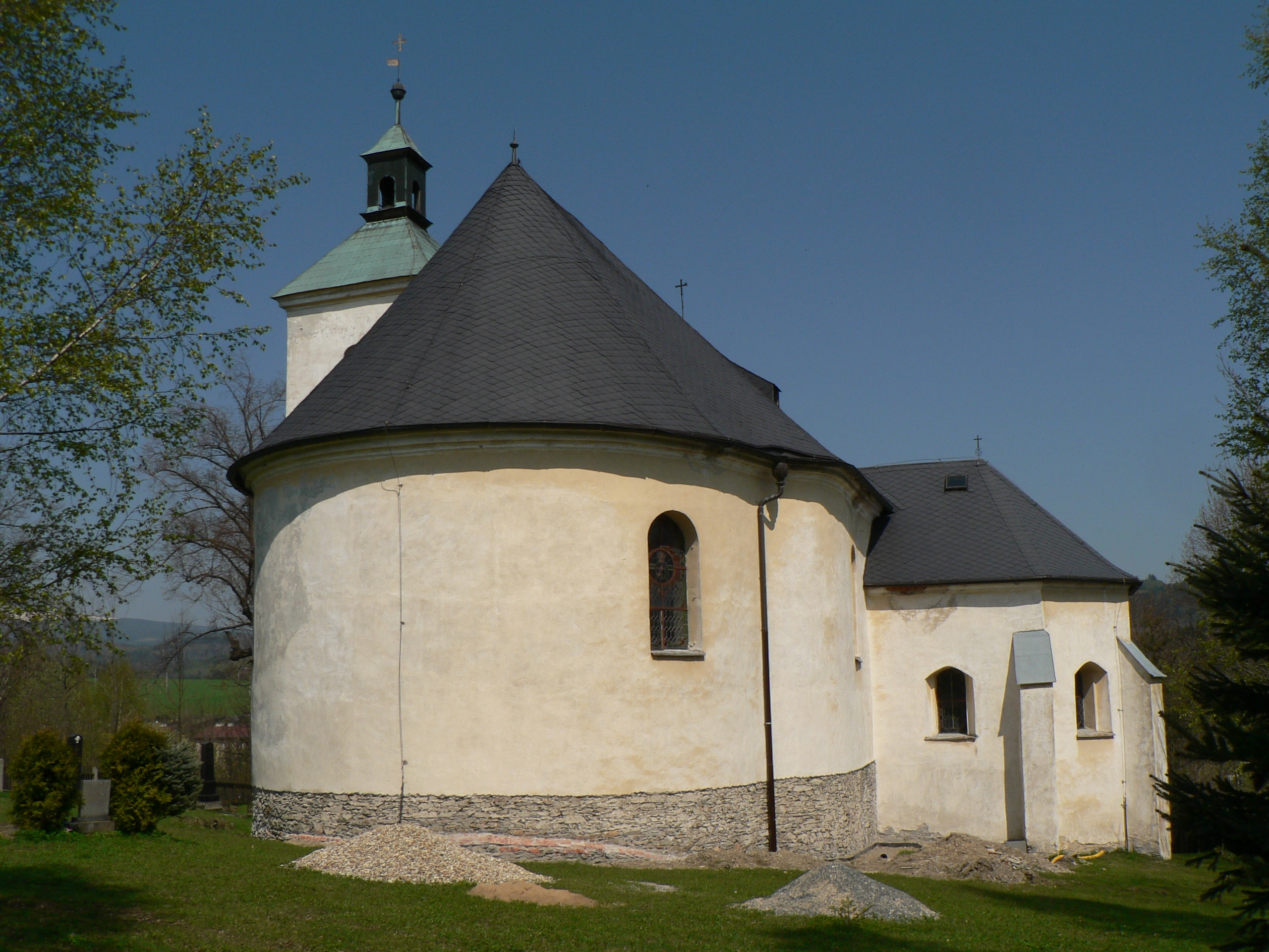 Kostel svatého Jakuba Většího (Dolní Moravice)